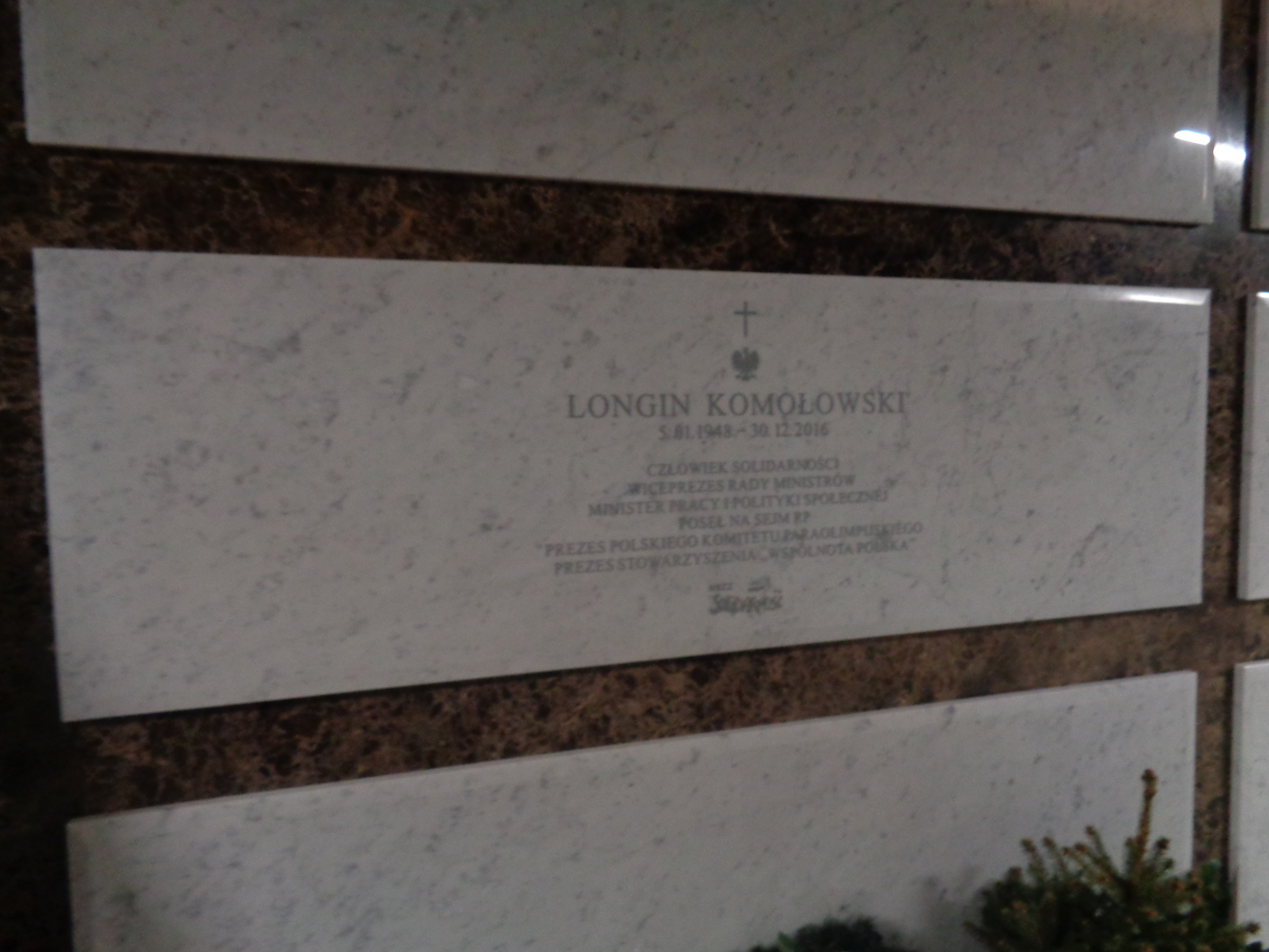 Grób Longina Komołowskiego w Panteonie Wielkich Polaków w Świątyni Opatrzności Bożej